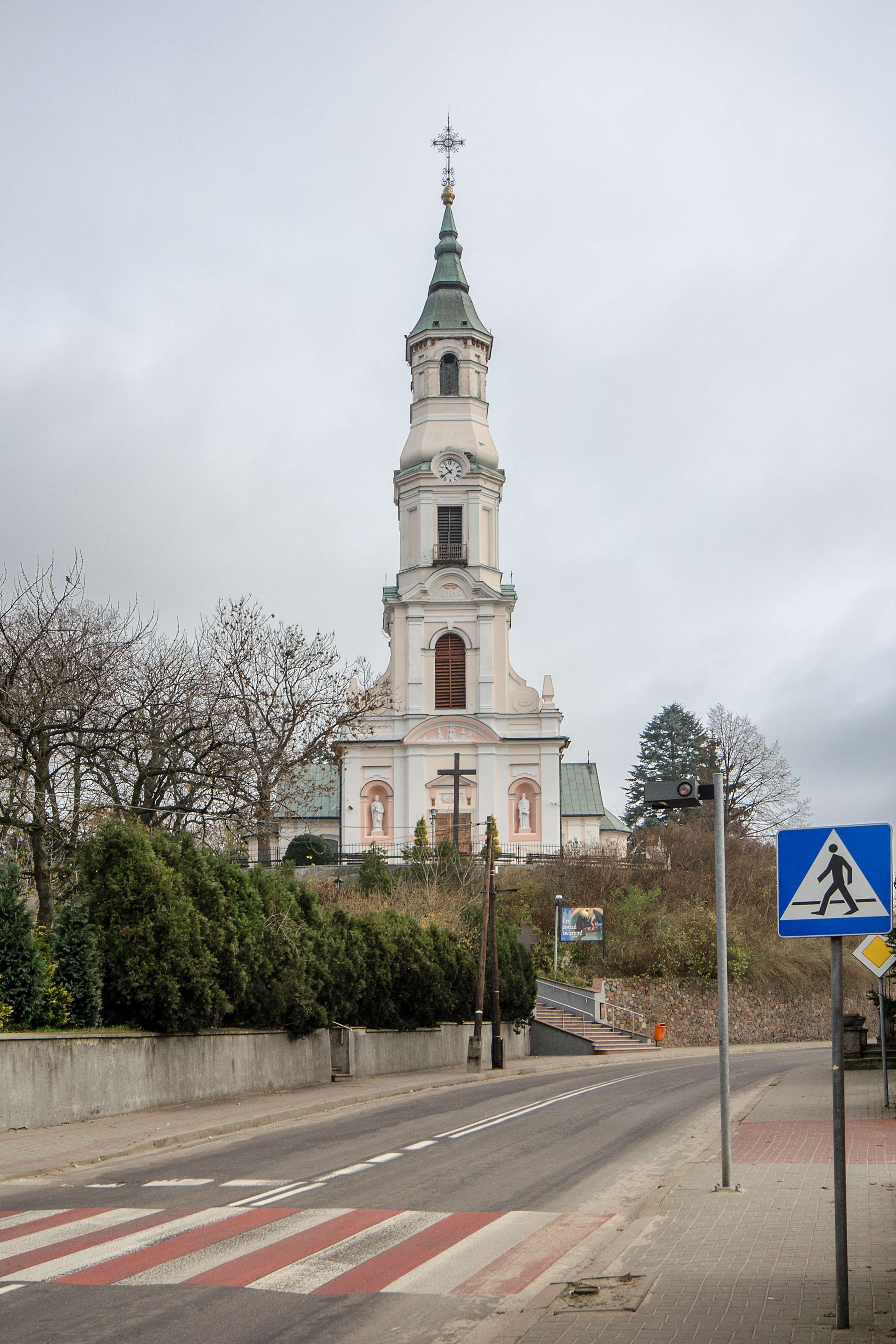 Tuliszków, kościół par. p.w. św. Wita, 1450, 1780, 1874-1877, 1884-1886